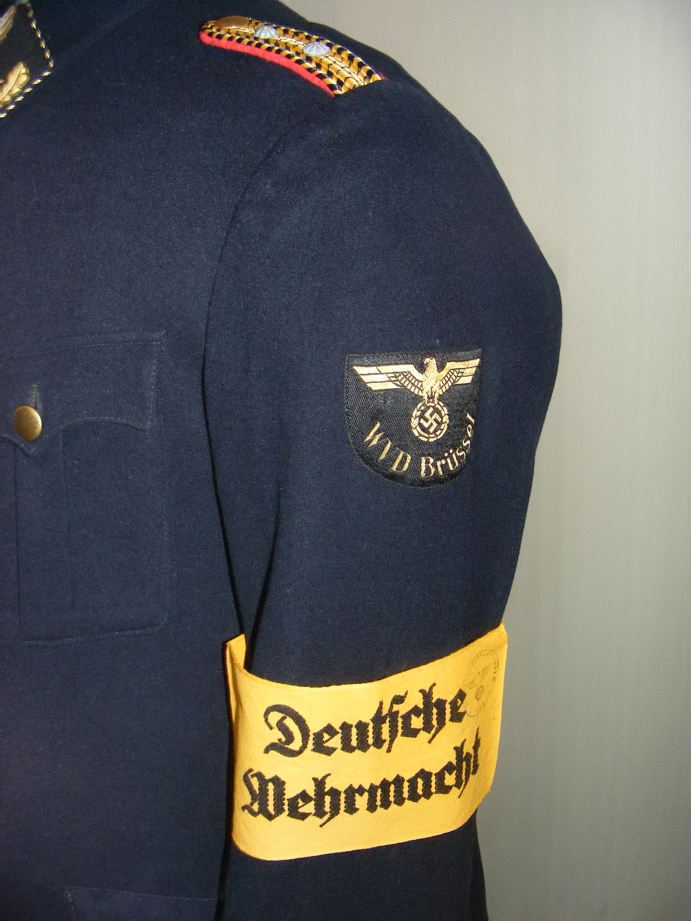 DB Museum Nürnberg - Uniformteile einer Amtsperson der Wehrmacht Verkehrsdirektion Brüssel